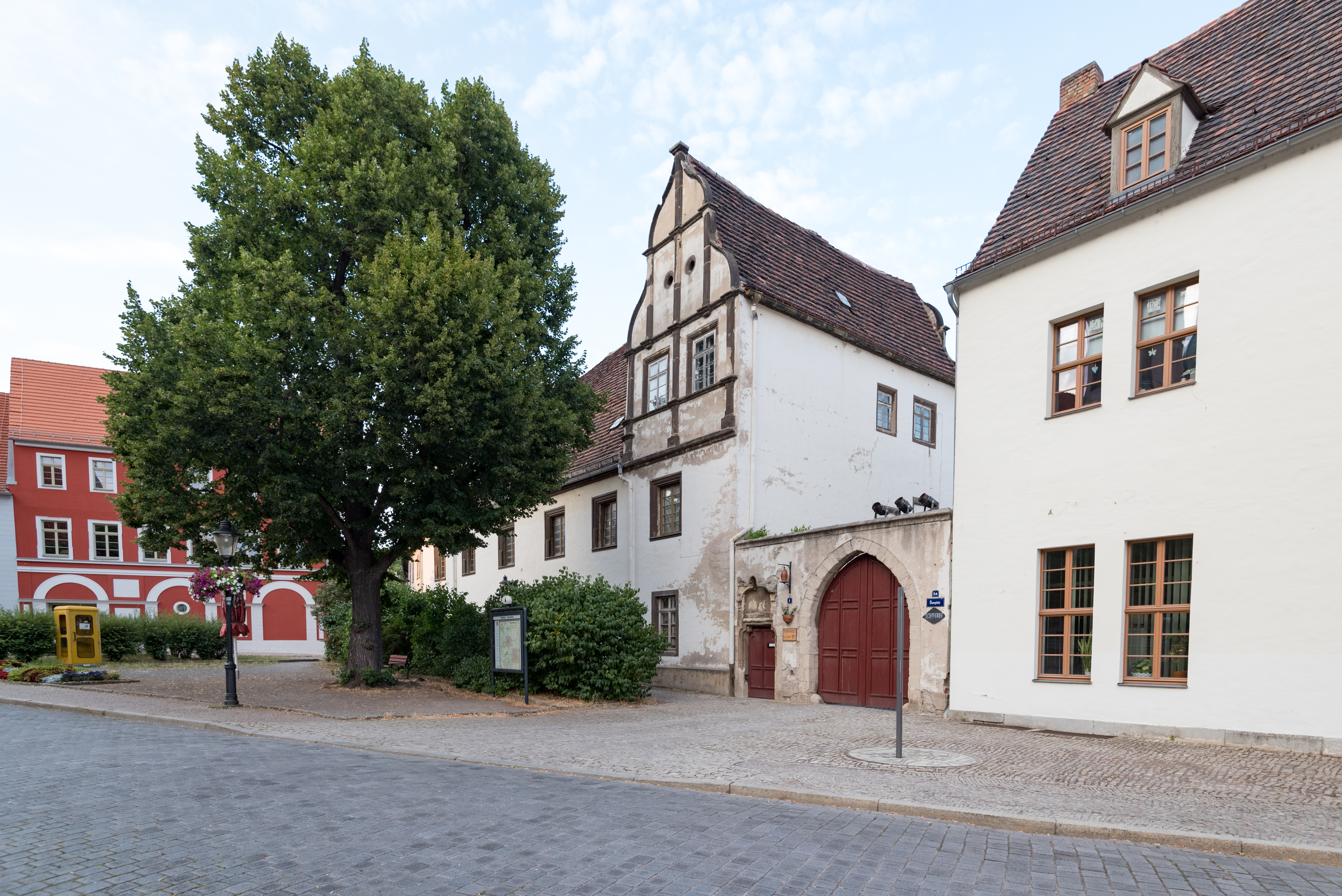 Naumburg (Saale), Domplatz 1